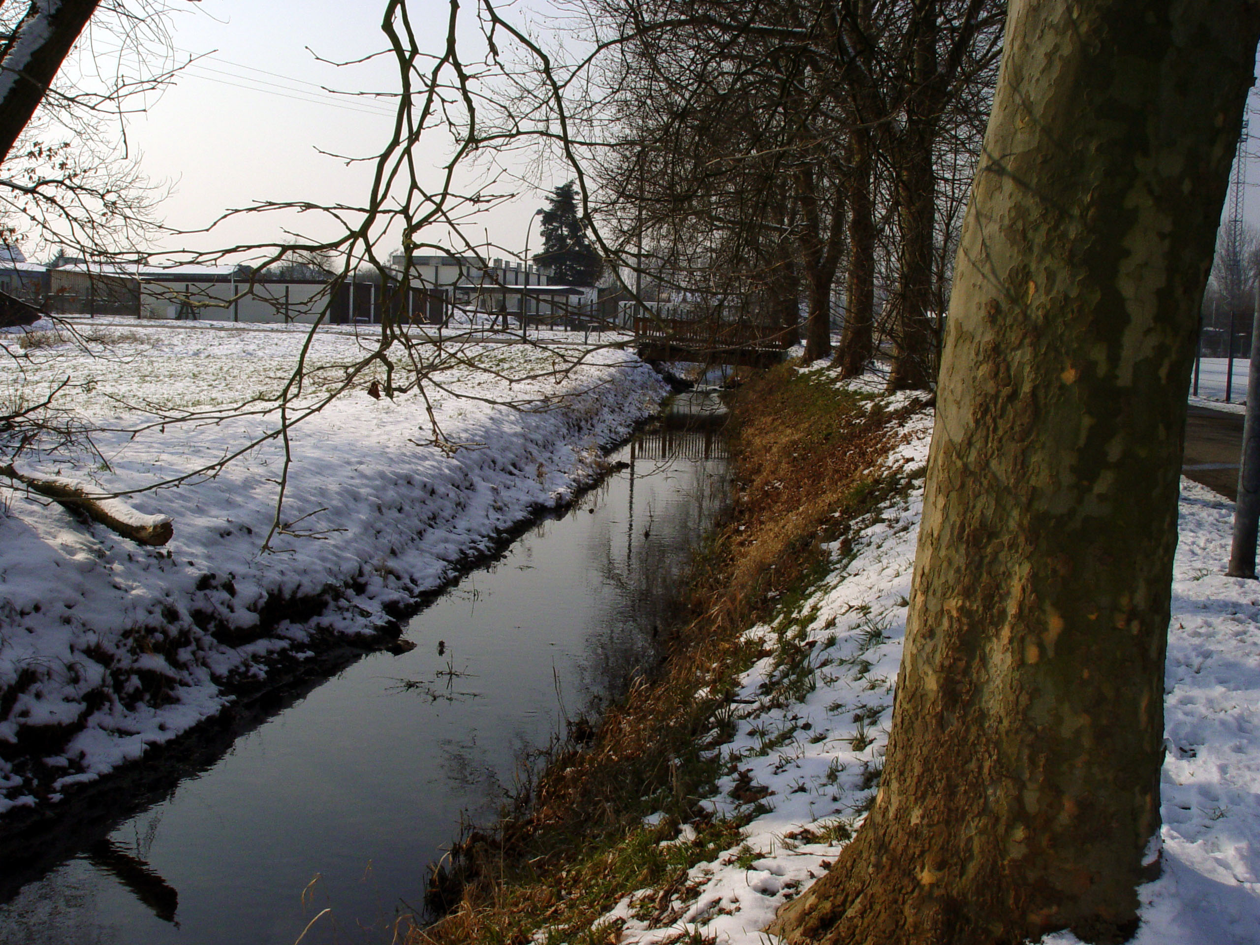 Fotografiert von Martin Dürrschnabel. Der Federbach in Bietigheim.